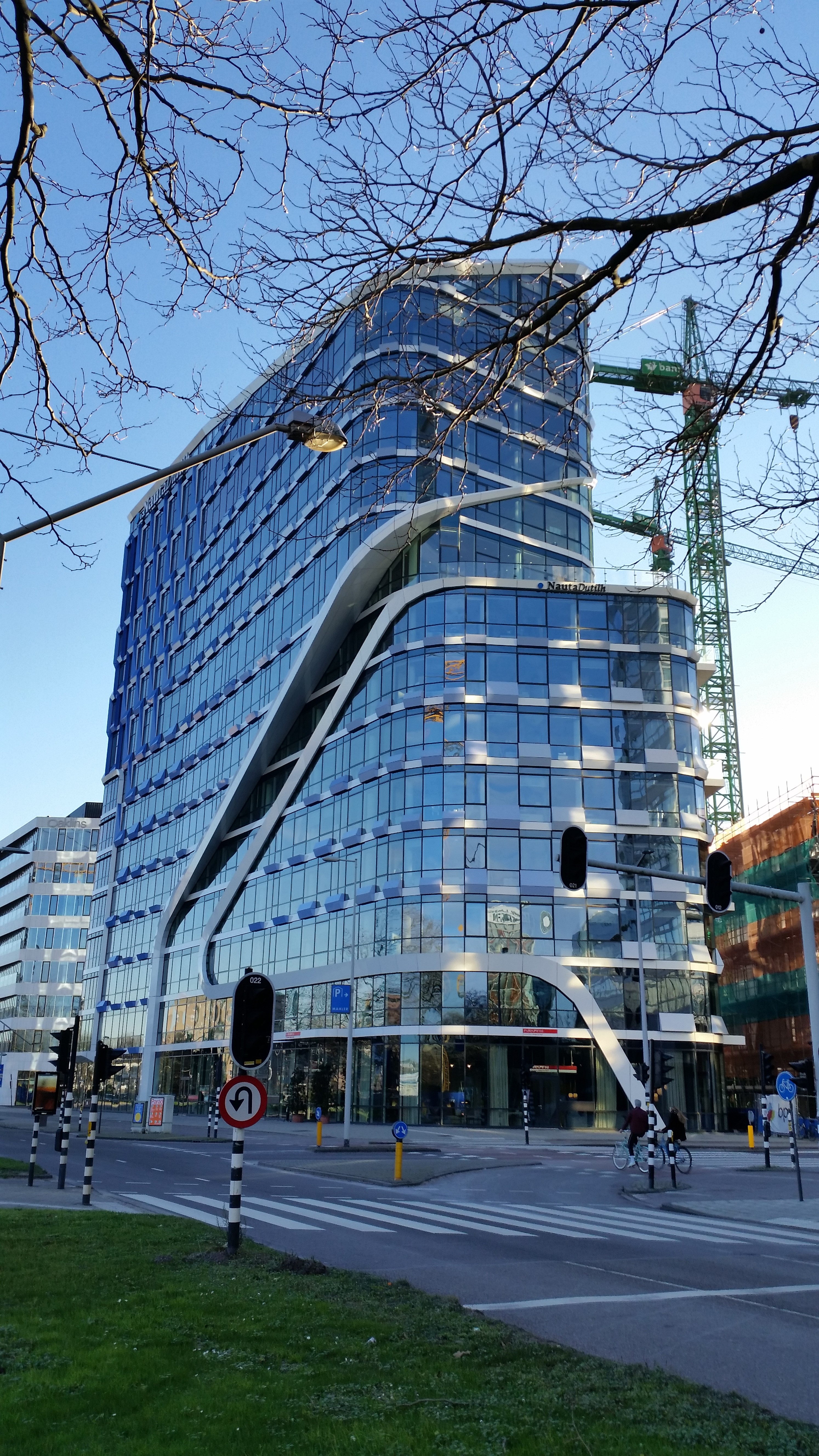 Beethovenstraat 400, Amsterdam